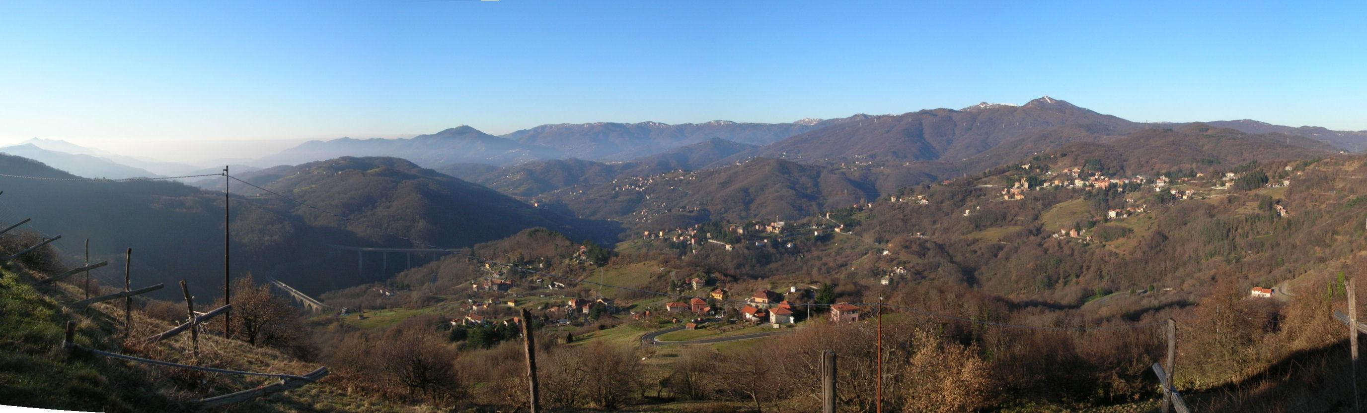 Panorama dell'alta valle del torrente Riccò (Mignanego, Genova) Foto propria Dicembre 2008 Licensing Categoria:Mignanego